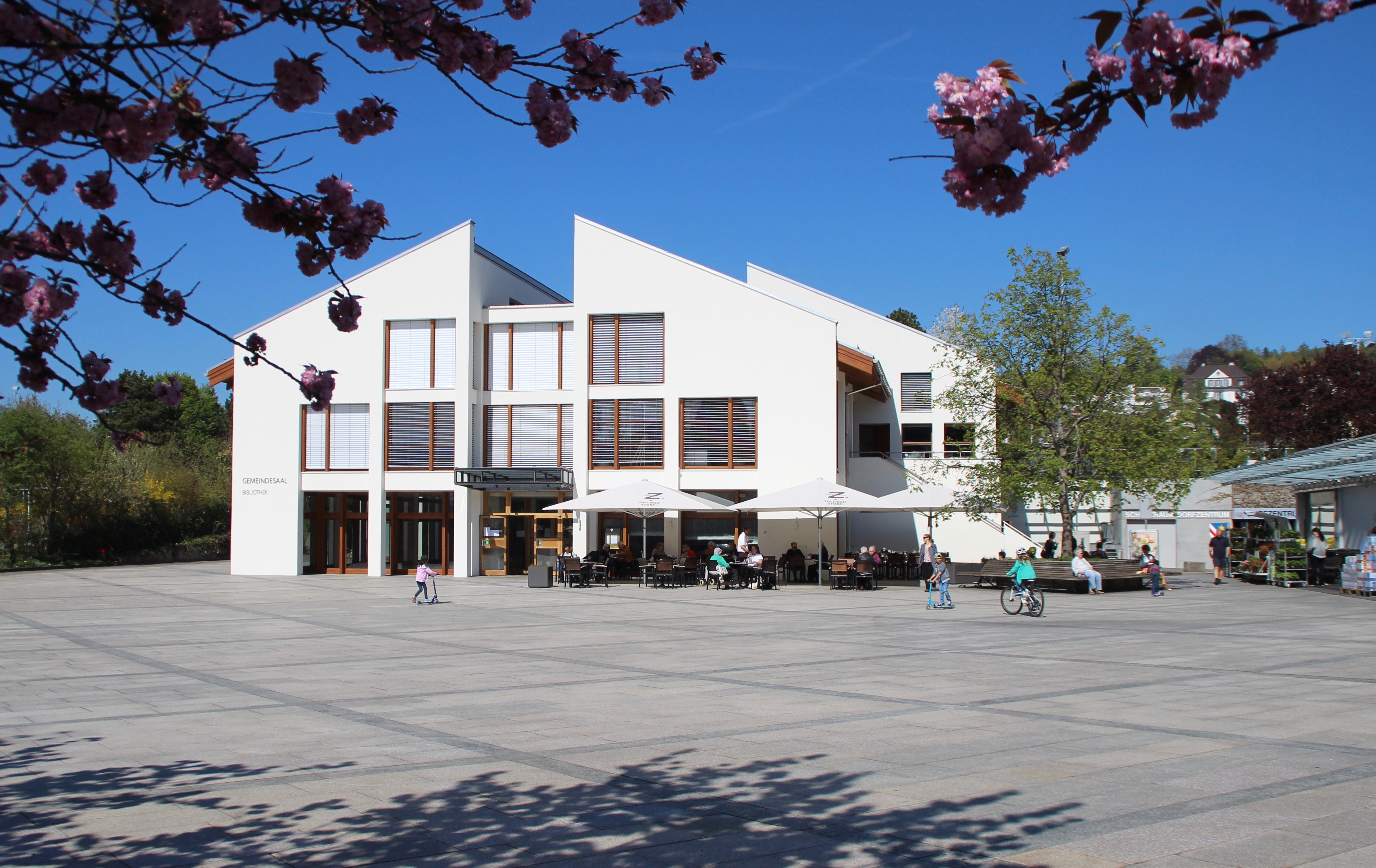 Gemeindesaal am Dorfplatz in Zollikon